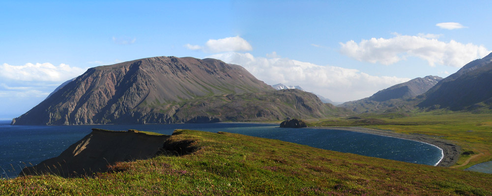 Myndin er tekin af mér (is:notandi:oliagust)